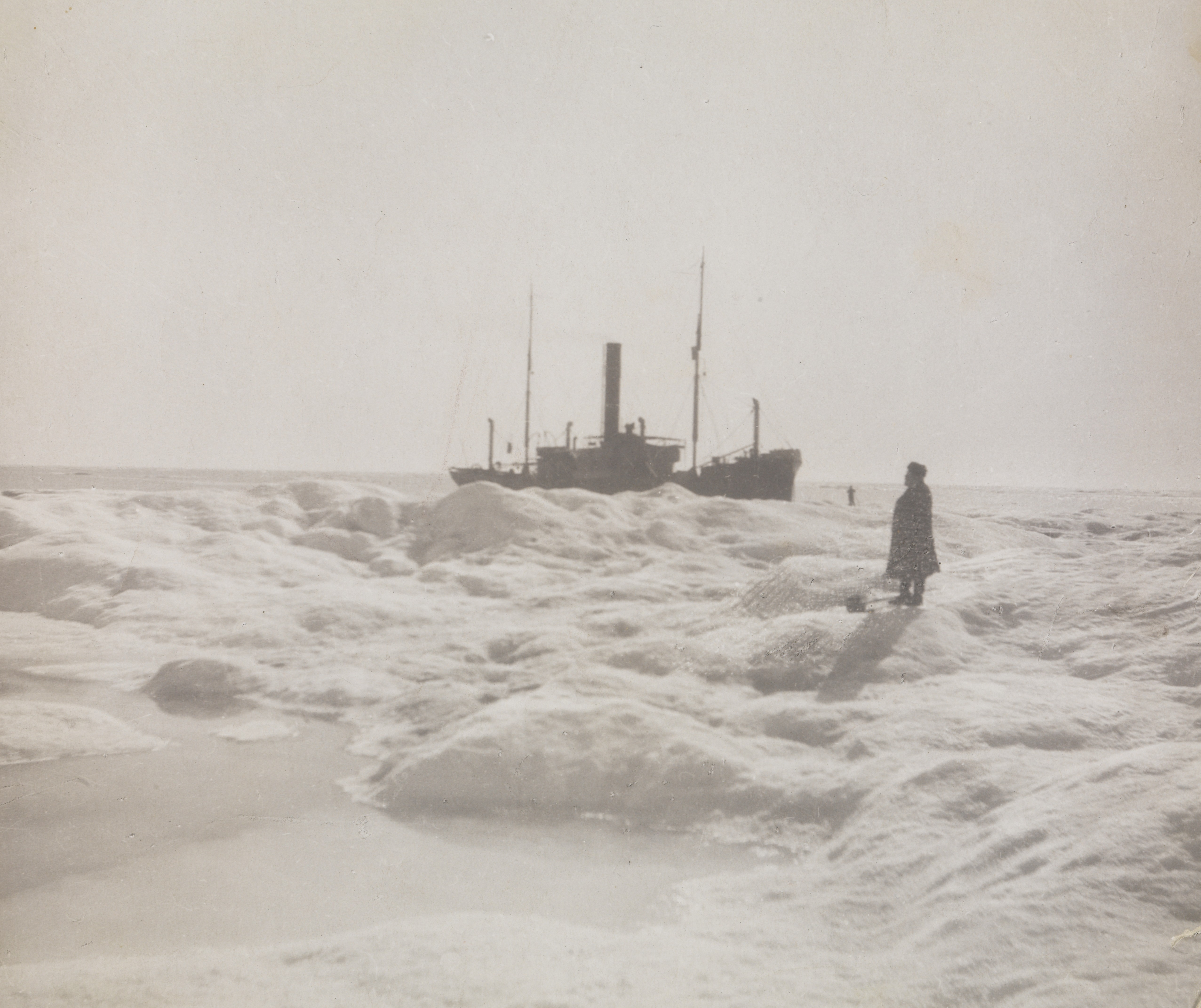 Stephan Vasilievitsj Vostrotin (gullgruveeier fra Jenisejsk) på den faste isen utenfor Jamalkysten. Ett av bildene fra reisen til Sibir i perioden 2. august-26. oktober 1913. Fridtjof Nansen startet sin transsibirske reise med et handelsskip fra Oslo til Jenisej. Ferden gikk gjennom deler av nordøstpassasjen som skulle åpne for en kortere handelsforbindelse mellom Vest Europa og Det Fjerne Østen. Depicted person: Vostrotin, Stephan Vasilievitsj Depicted place: Karahavet